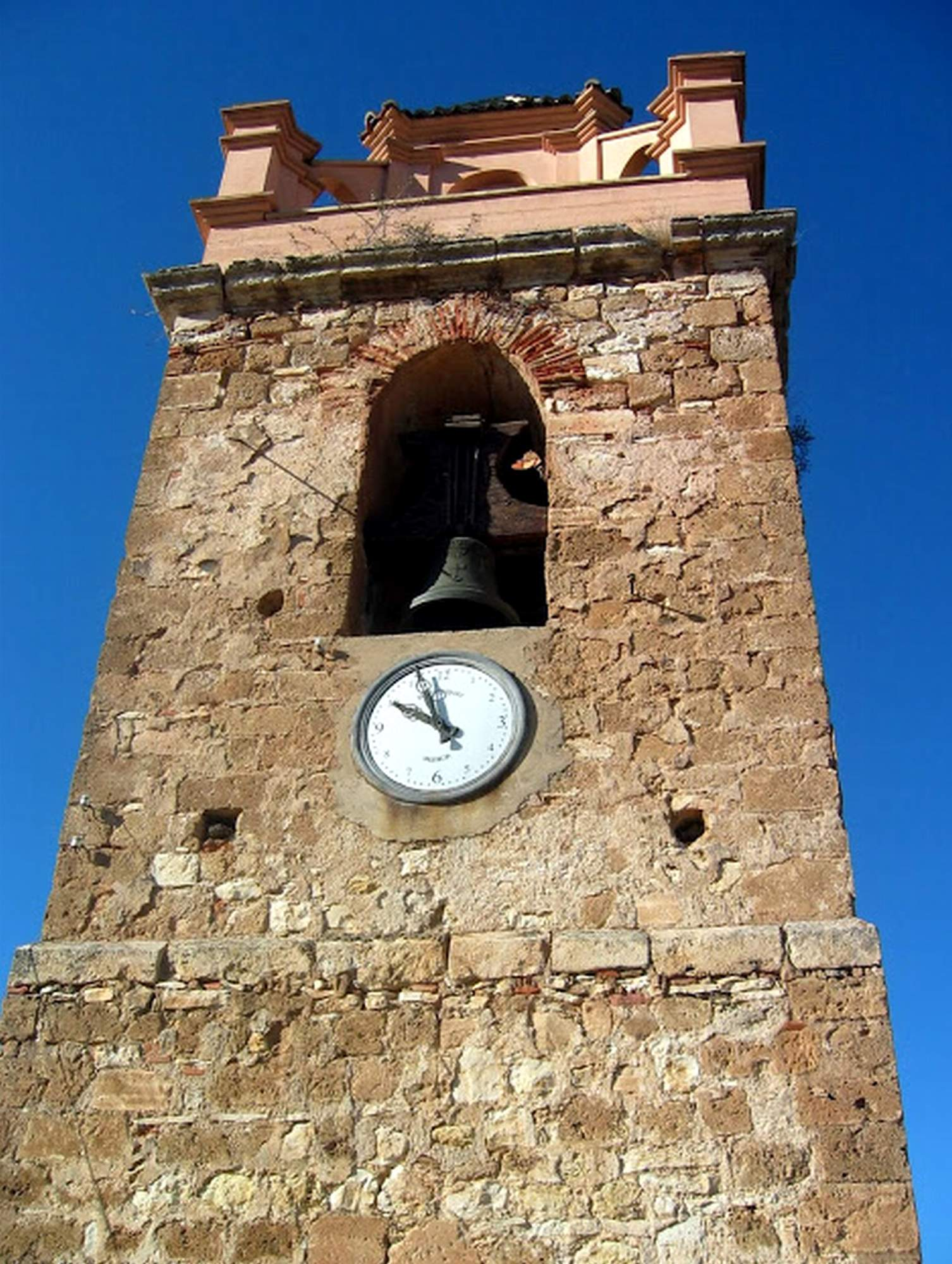 Detalle de la fachada meridional de la torre campanario de la parroquial de Castielfabib (Valencia), detalle de la esfera del reloj bajo el vano de la campana "María de los Ángeles" (1918), que mira al castillo.